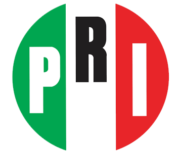 Partido Revolucionario Institucional